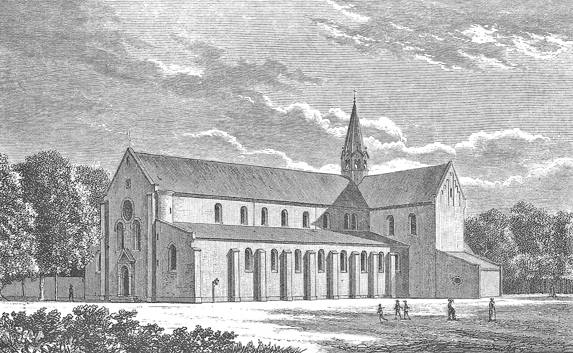 Sorø Klosterkirke er bygget som en gravkirke for Hvideslægten. Den berømteste af Hviderne, biskop Absalon, indkaldte cisterciensermunkene, fra Esrum Kloster, i 1161 til at bygge kirken og klosteret